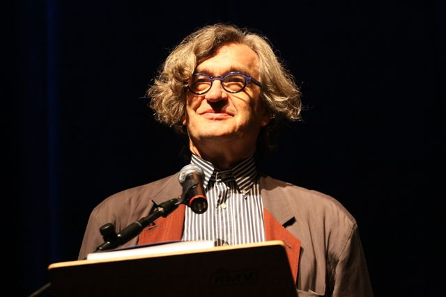 A cerimônia de abertura da 34ª Mostra Internacional de Cinema de São Paulo foi realizada nesta quinta-feira (21), no Auditório Ibirapuera. A Mostra começa nesta sexta-feira (22) e vai exibir 400 produções em mais de 20 espaços, entre cinemas, museus e centros culturais em toda a capital paulista. Win Wenders, cineasta alemão. Foto: Marcos Fioravanti